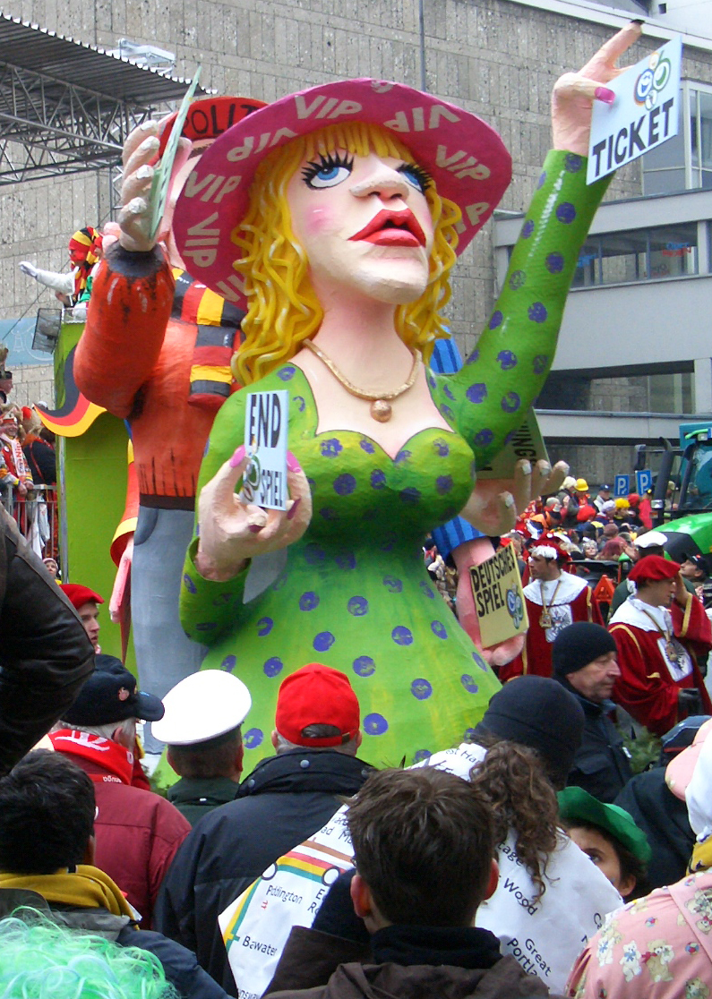 Wagen Rosenmontagszug 2006